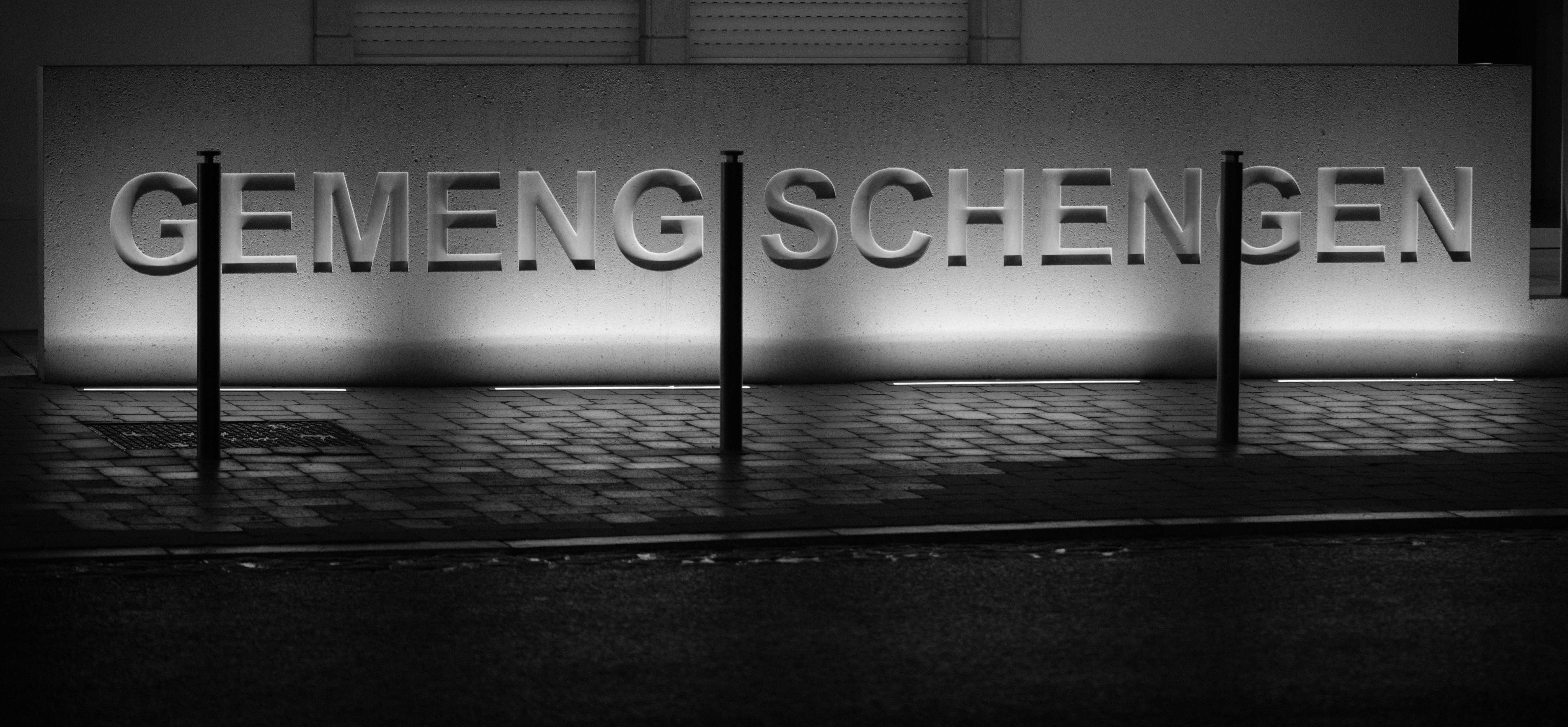 Gemeng Schengen zu Rëmerschen.